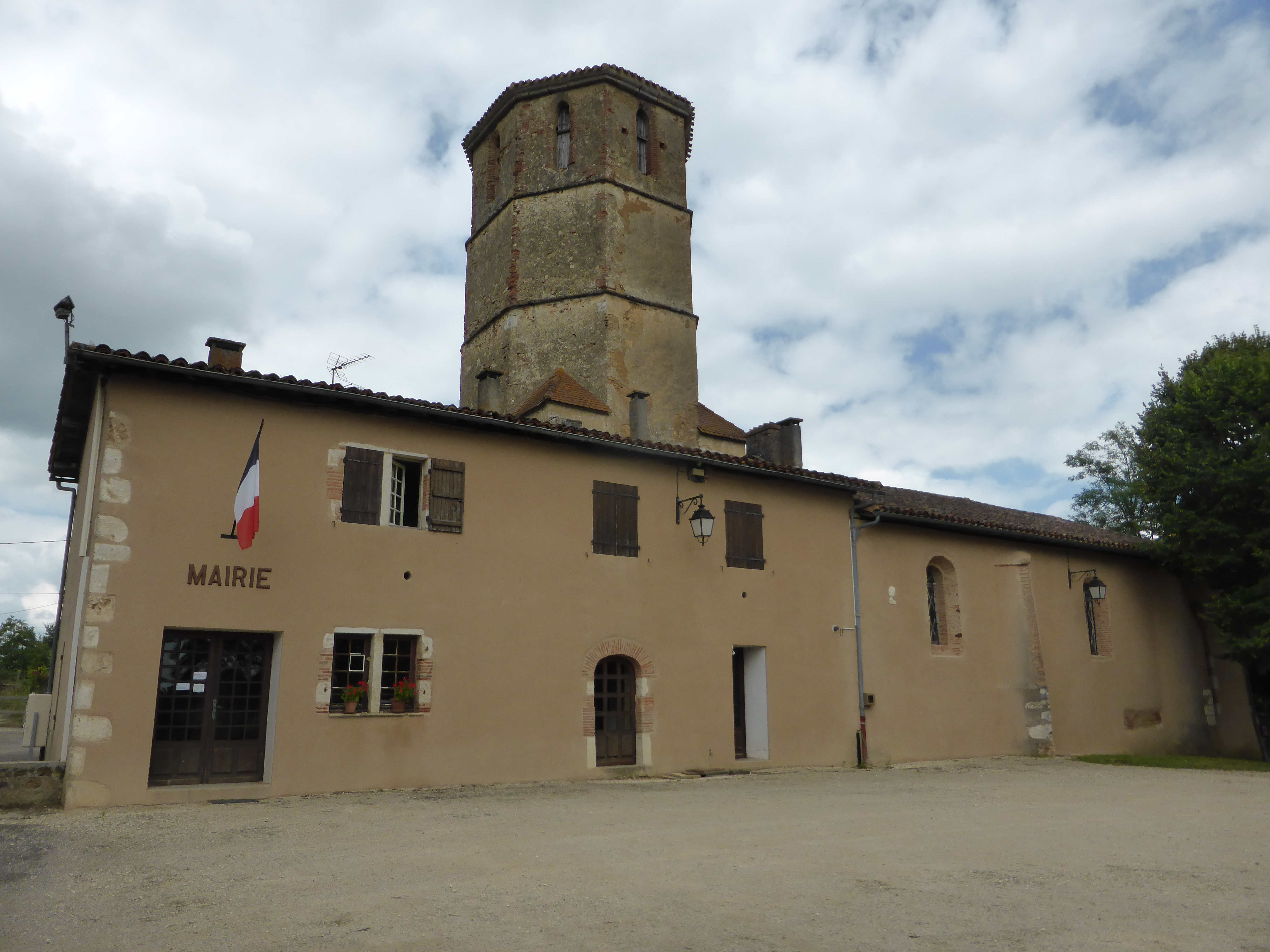 Mairie de Castex d'Armagnac et église Saint-Cane, dans le Gers